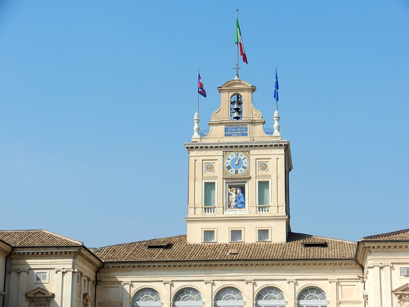 Roma - Torretta del Palazzo del Quirinale vista dal cortile